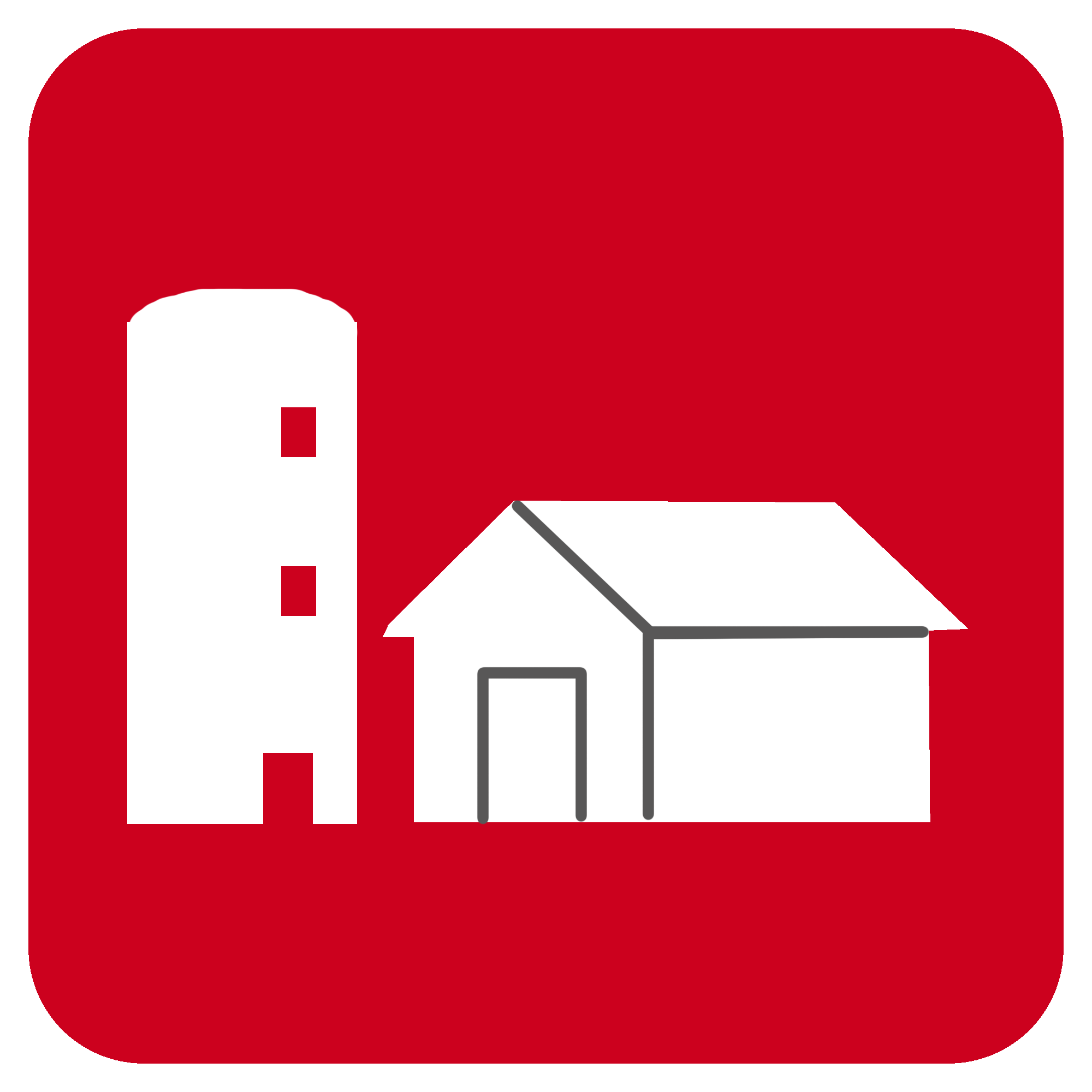 Símbolo utilizado para identificar a la estación Graneros en 2001.